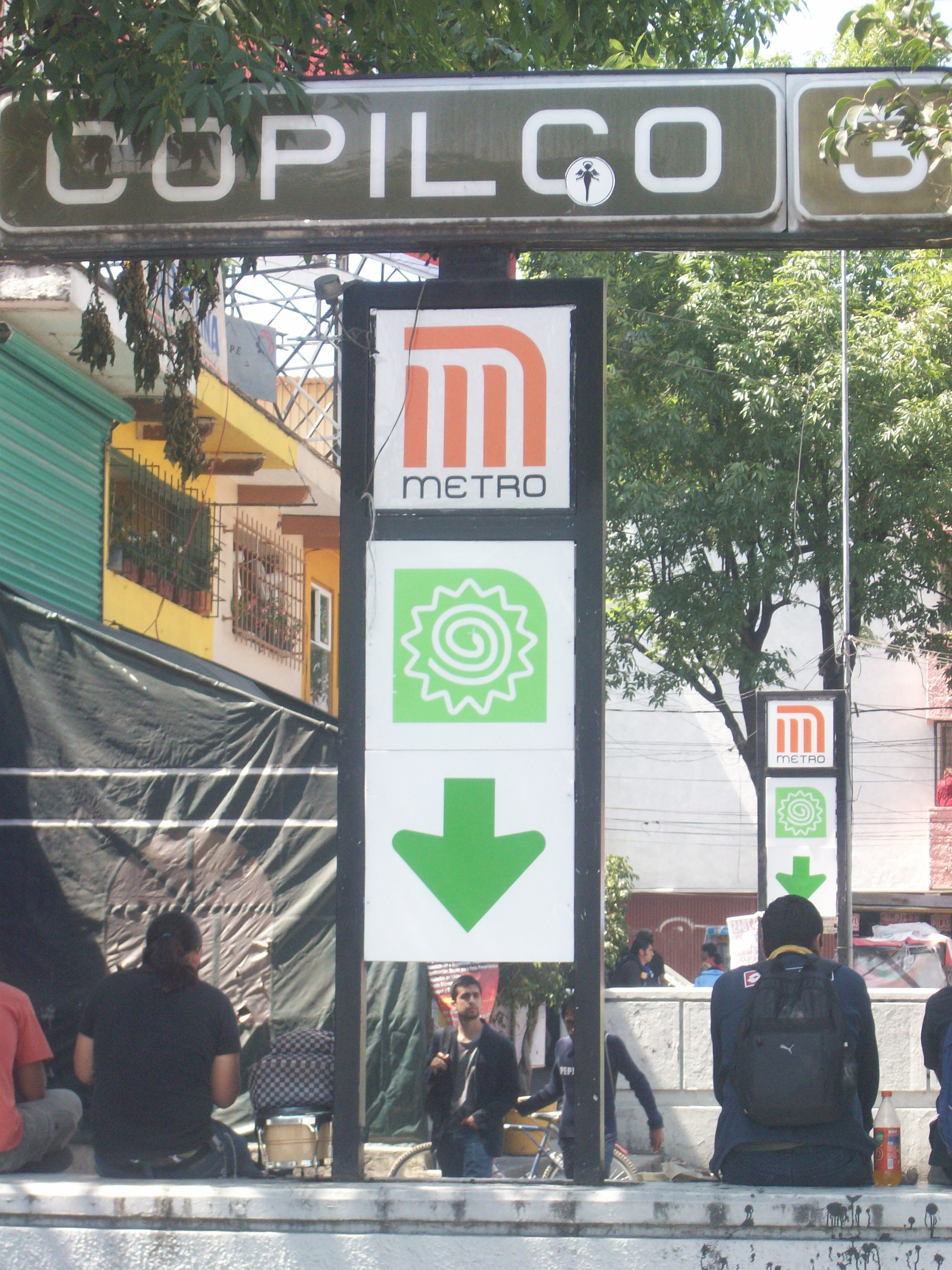 letrero indicativo de la estación Copilco